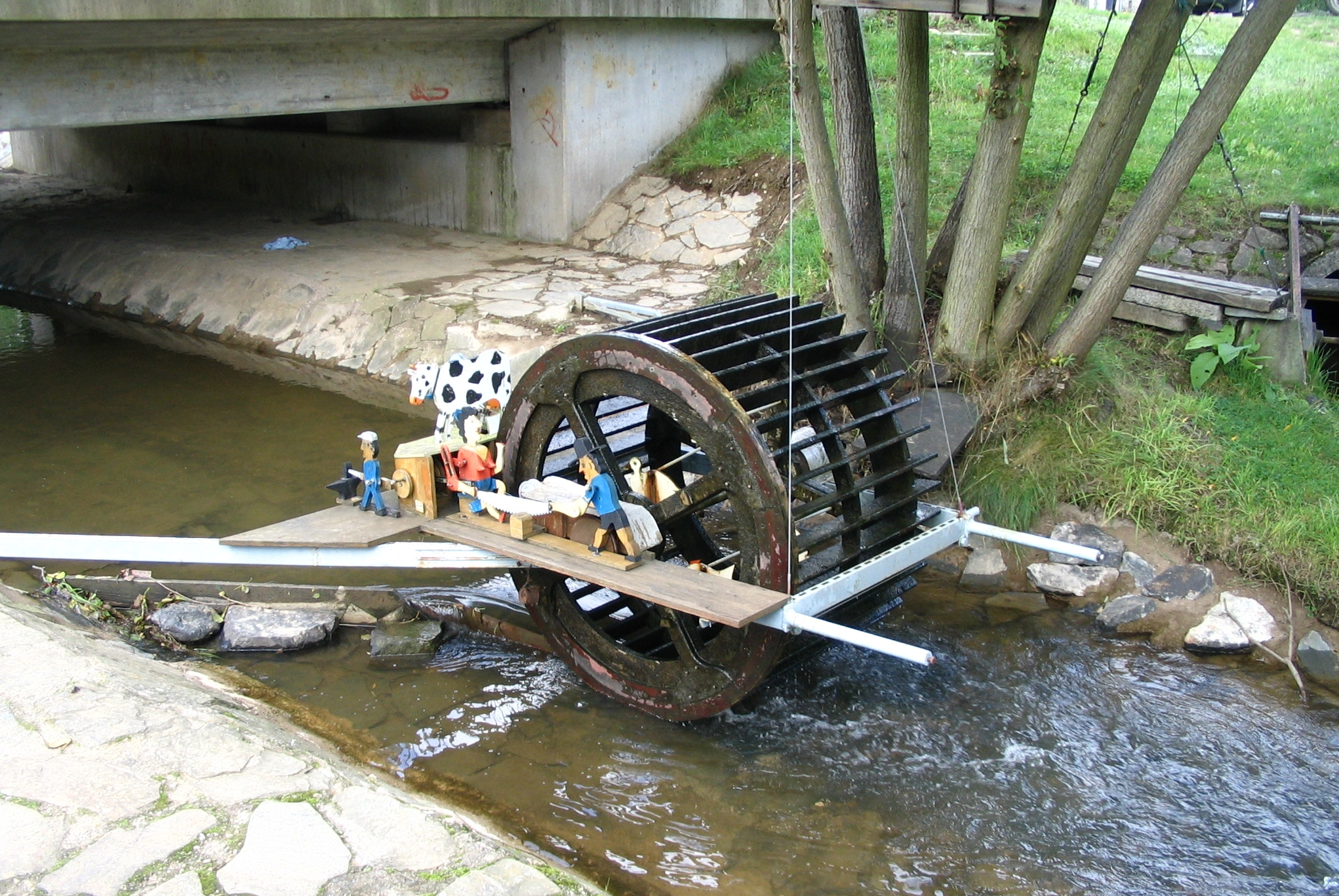 Wasserrad am Külzbach in Neuerkirch